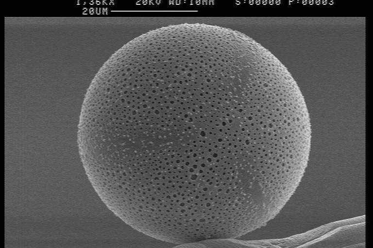 Lepismium lorentzianum Pollen